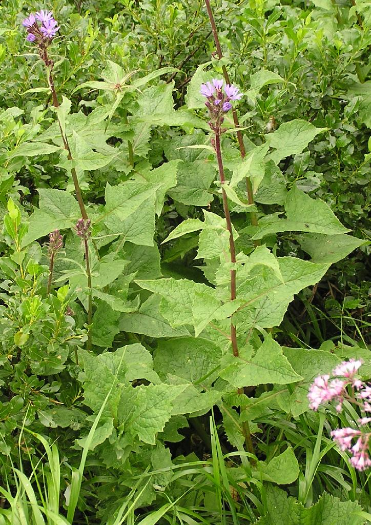 Cicerbita alpina, aufgenommen bei Lech in Vorarlberg (Österreich)